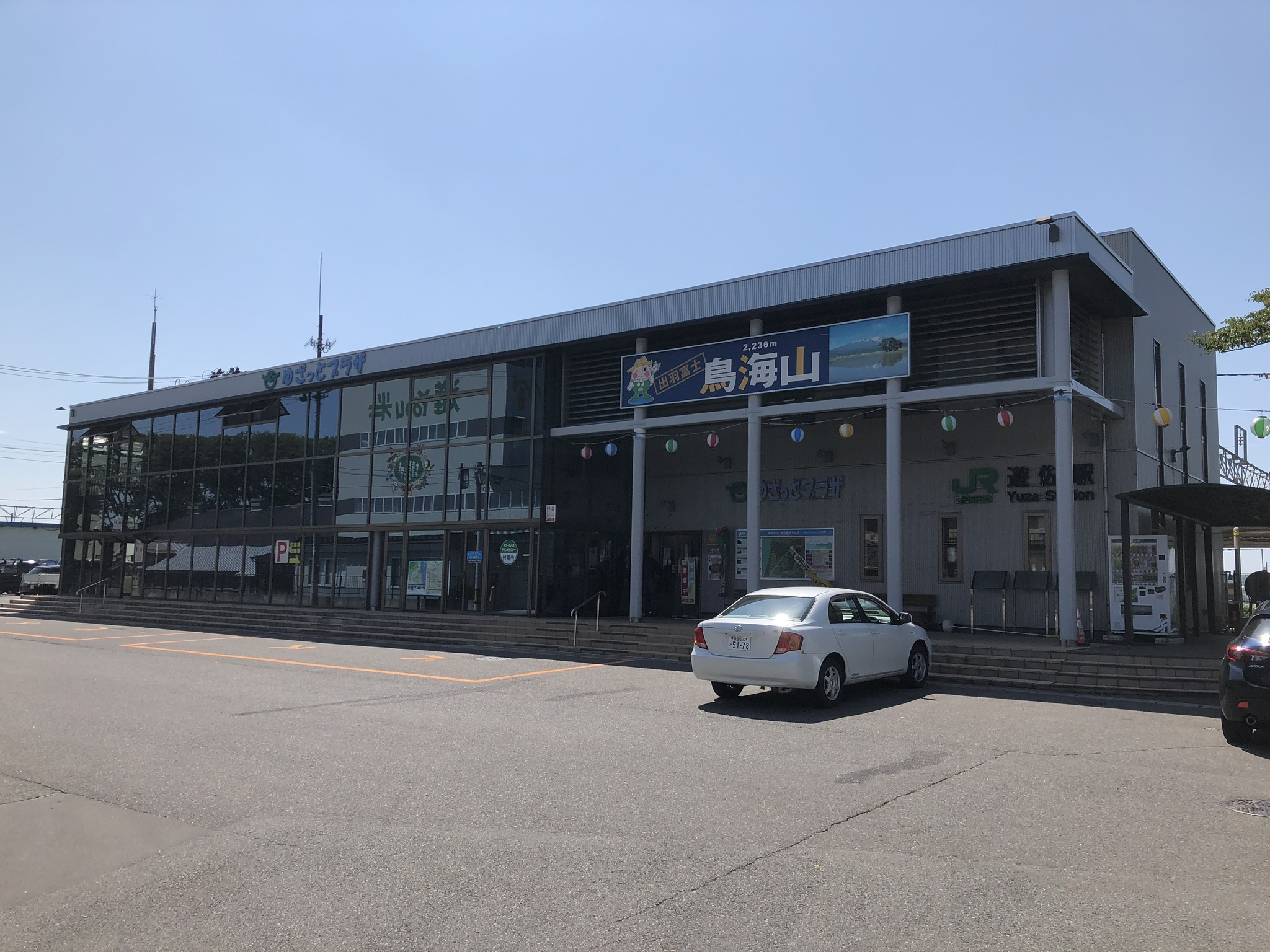 羽越本線遊佐駅駅舎